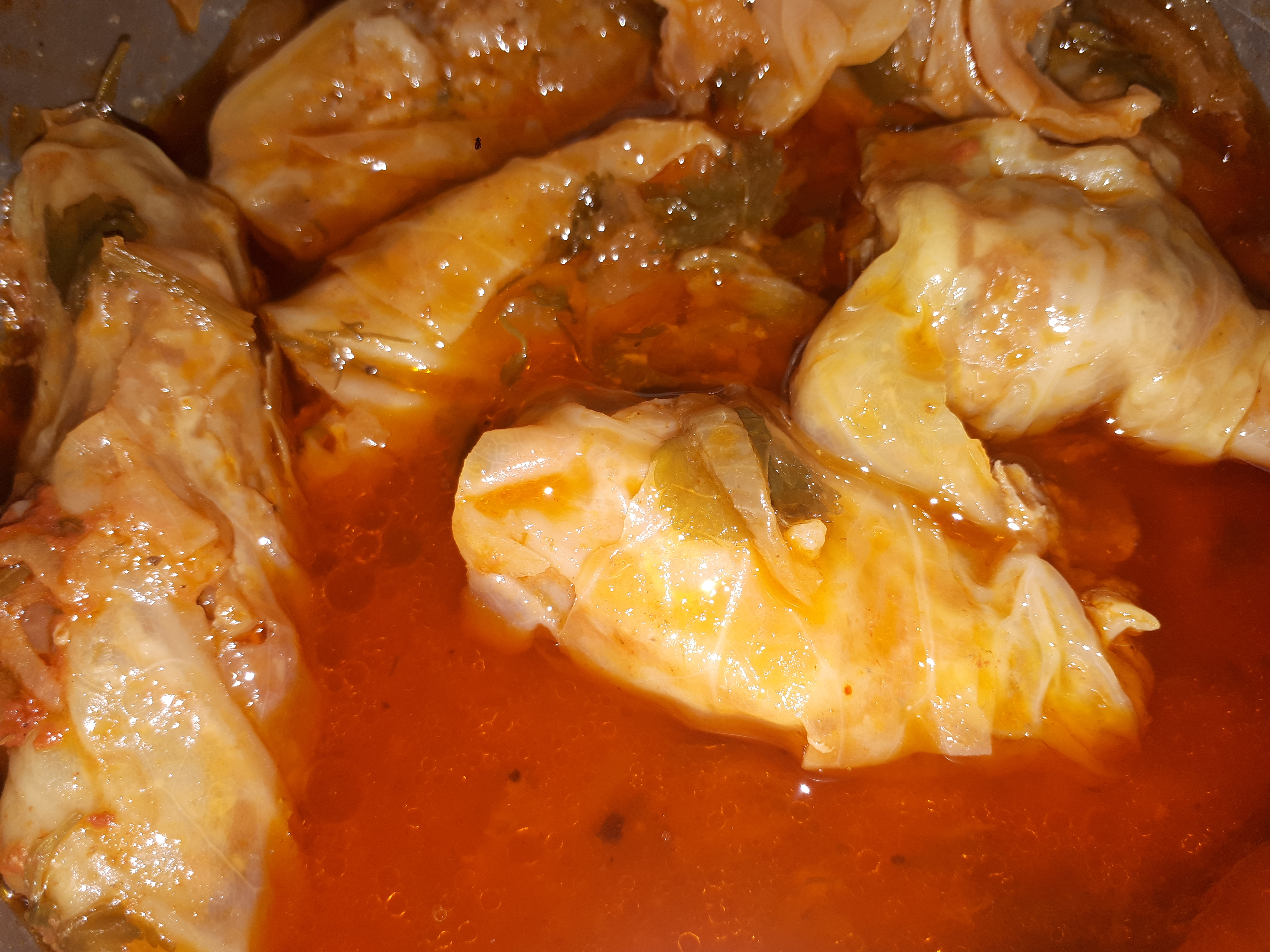 Голубцы